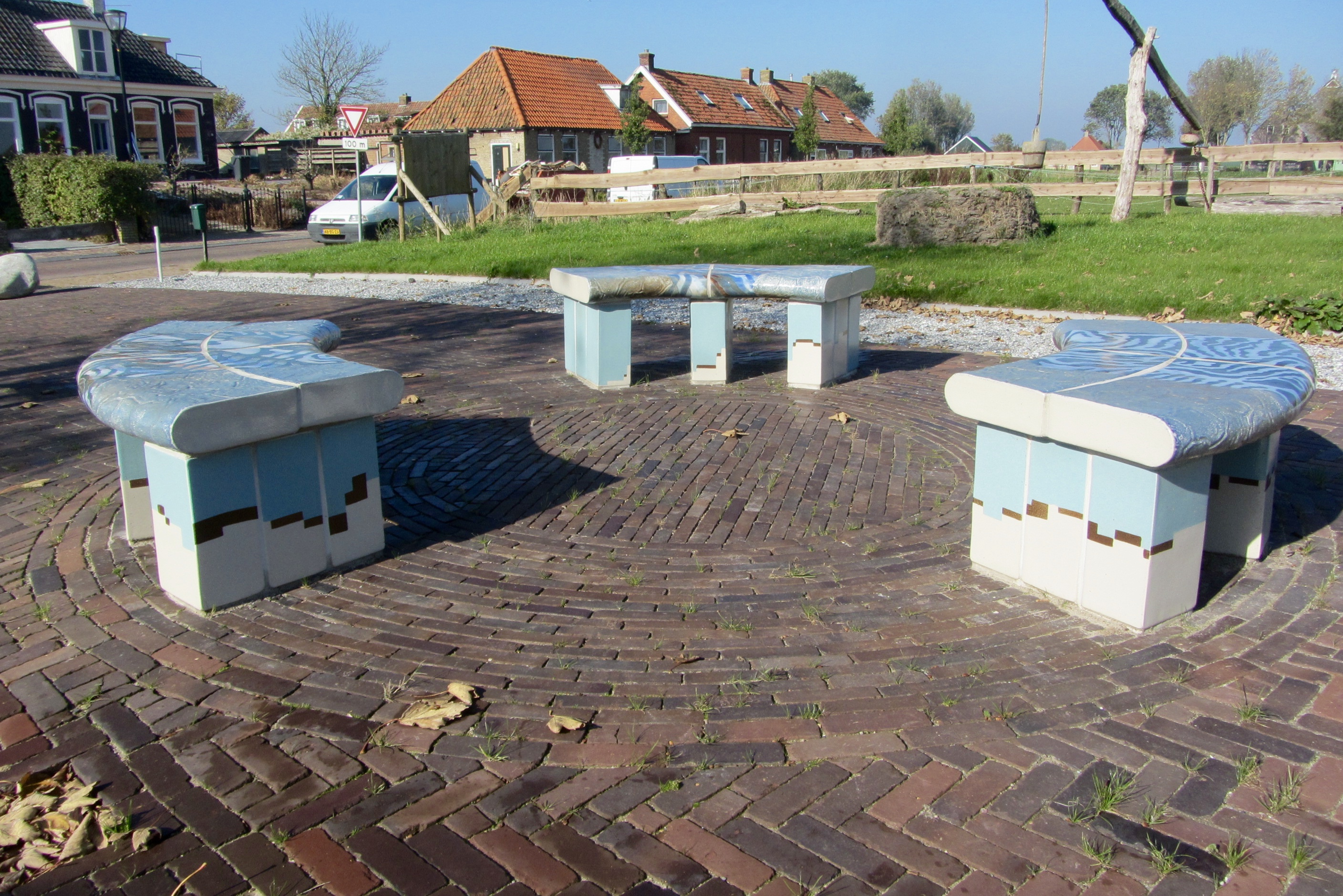 Dijkshoek, Firdgum, De Mieden (2017) van Paulien Ploeger. Keramiek. Plaats: Camstrawei 18 te Firdgum, Friesland.